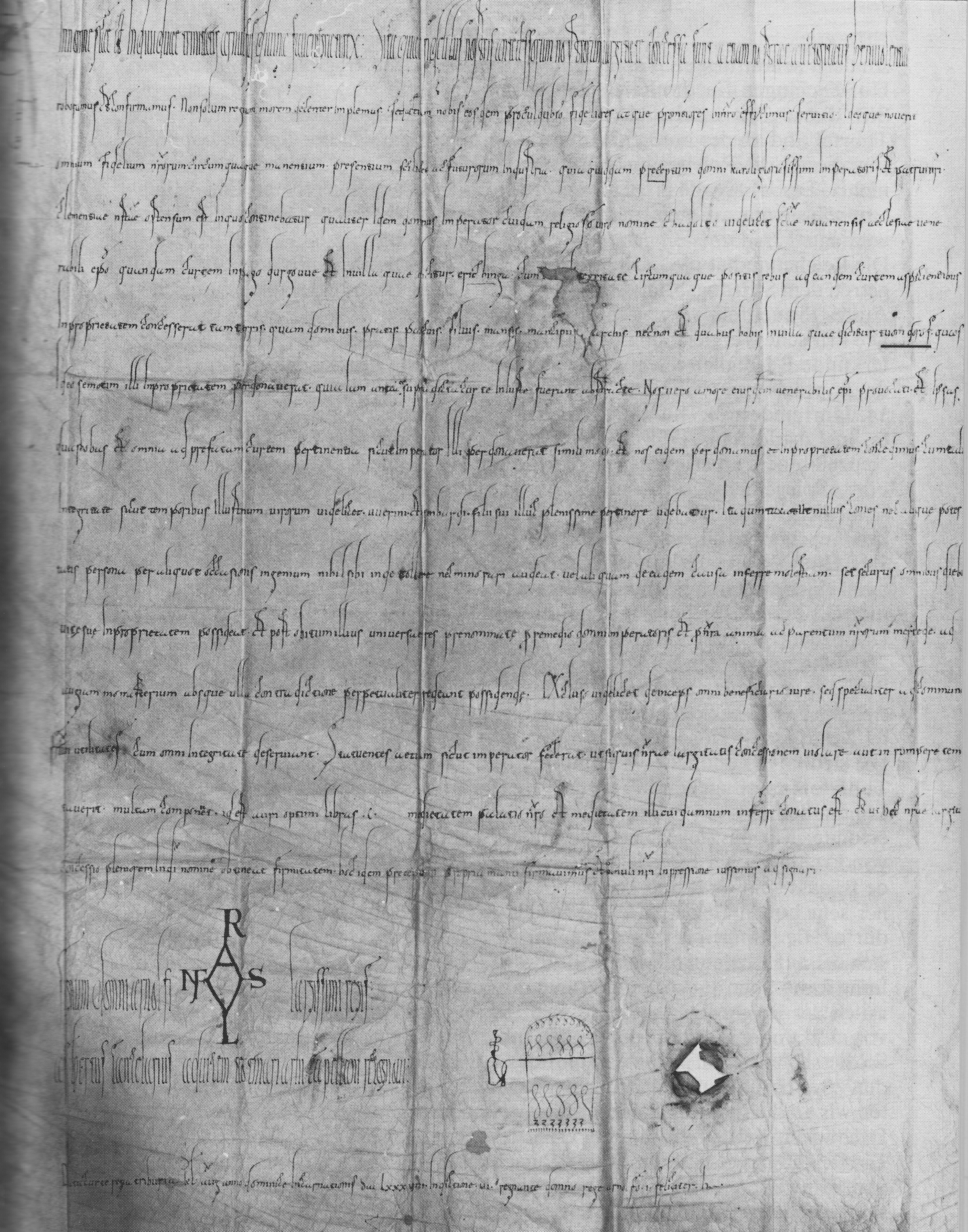 Beſtätigungsurkund König Arnulfs für die Schenkung des Hofs Erchingen ſammt Zůbehör ans Kloſter Reichenau, datirt auf den 1. August 888; angefertigt wohl im 11./12. Jahrhundert. Das zweitletzte Wort der ſechſten Zeile (tuomdorof, in der Copie unterſtrichen) stellet die erſte Erwähnung Thůndorffs im Thurgau dar. Deutſche Überſetzung der erſten Zeilen nach einem überarbeiteten Tranſcript auf der Grundlag von: Friedrich Schaltegger, Thurgauiſches Urkundenbuch I, hrsg. vom Thurgauiſchen Hiſtoriſchen Verein, Frauenfeld, Huber & Co., 1924, no. 134B, p. 156ſqq.: Im Namen der heiligen und unteilbaren Dreifaltigkeit, Arnulf, König von göttlich gewährter Gnade: Das, was Unſern Treuen aus Freygebigkeit Unsrer Vorfahren zůgestanden worden, bekräftigen und beſtätigen Wir so auch jetz aus Güte Unsrer Willkür. Nicht allein erfüllen Wir geziemend den Brauch der Könige, ſondern ...